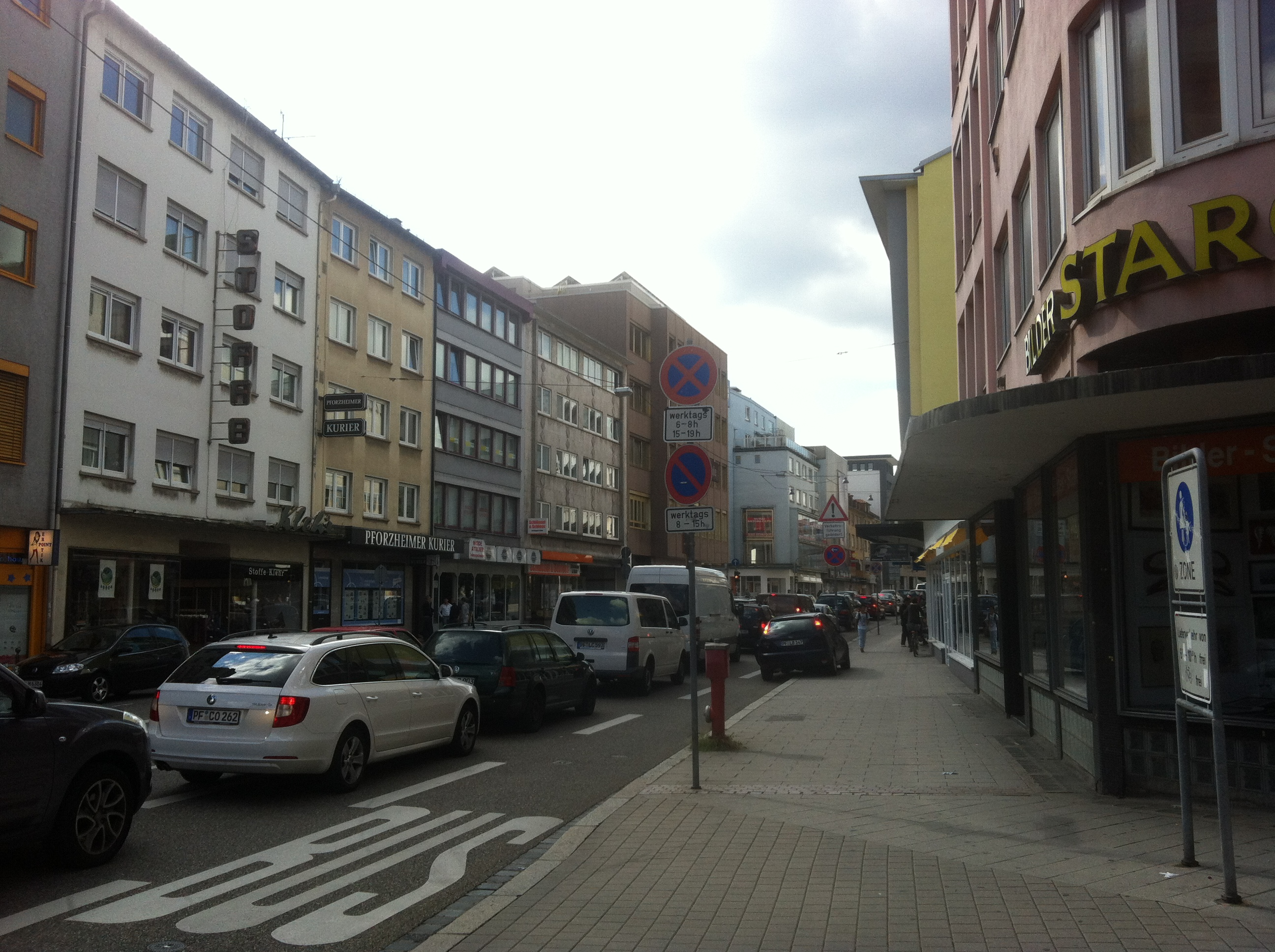 Städtebauliches Bild der 50er in der Innenstadt